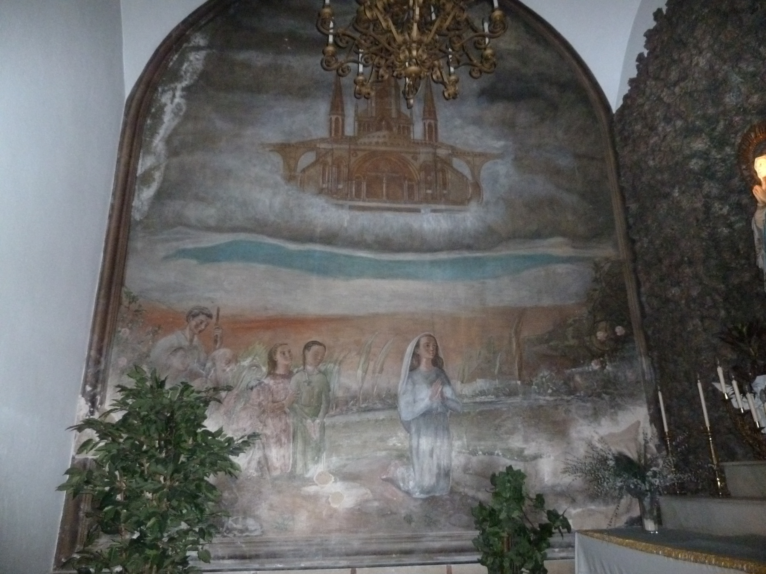 Reus